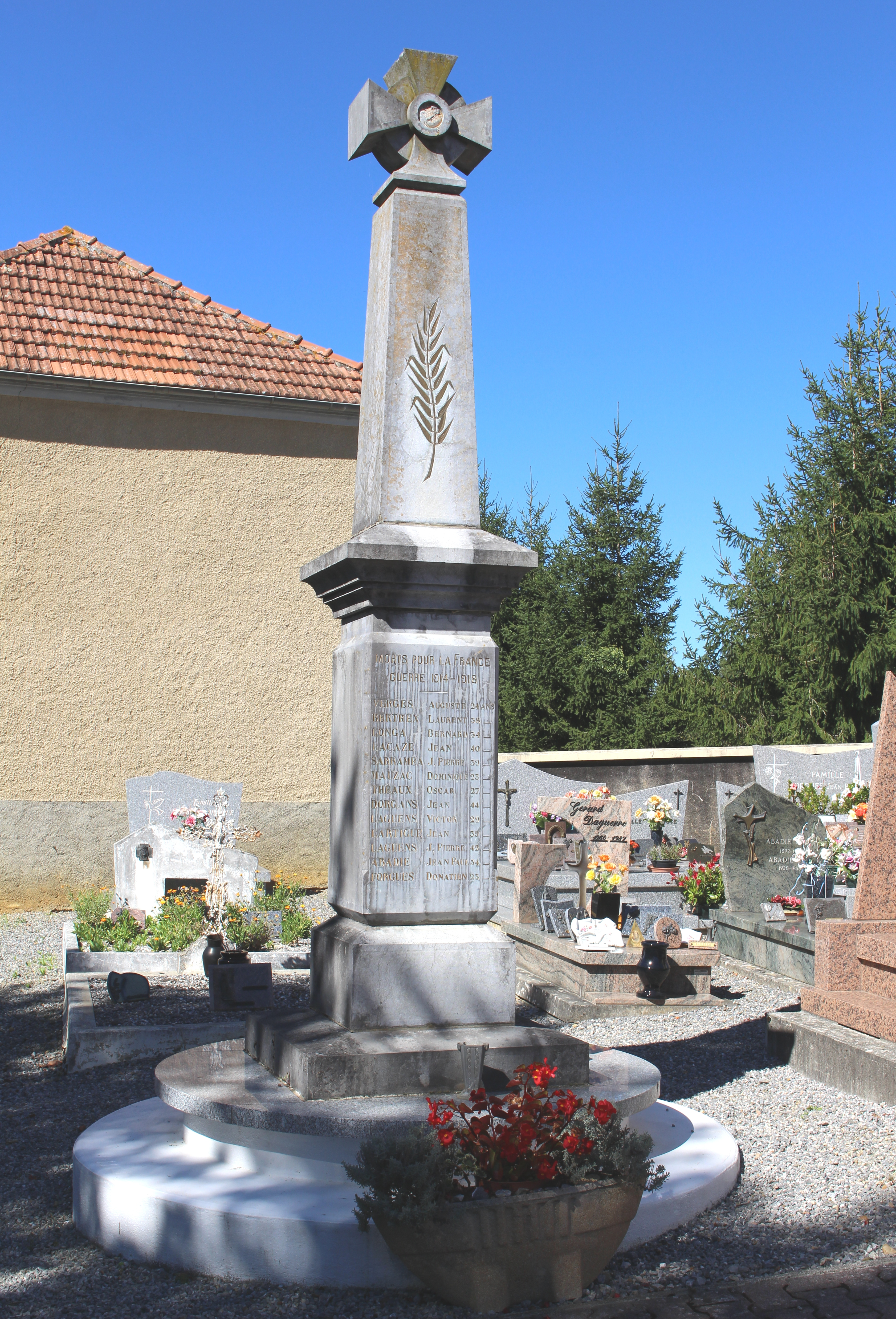 Monument aux morts de Bernadets-Dessus (Hautes-Pyrénées)